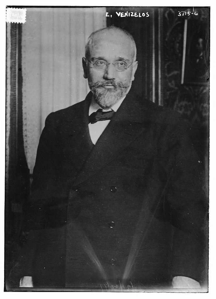 El político y primer ministro griego Elefterios Venizelos.